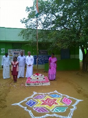 ஊராட்சி ஒன்றிய நடுநிலைப் பள்ளி, வி.லெட்சுமிபுரம்